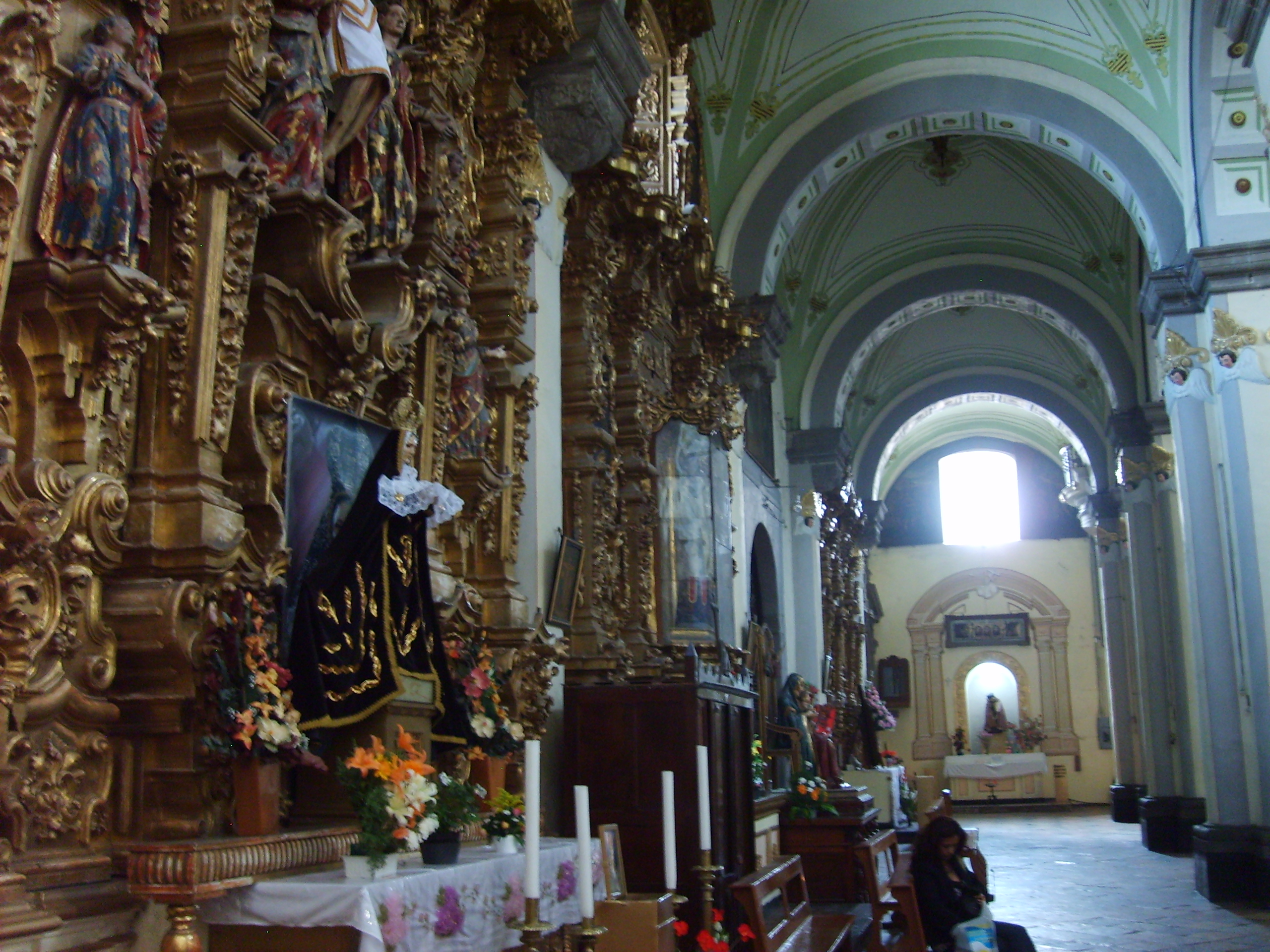 Retablos barrocos de la Parroquia de San José en Puebla